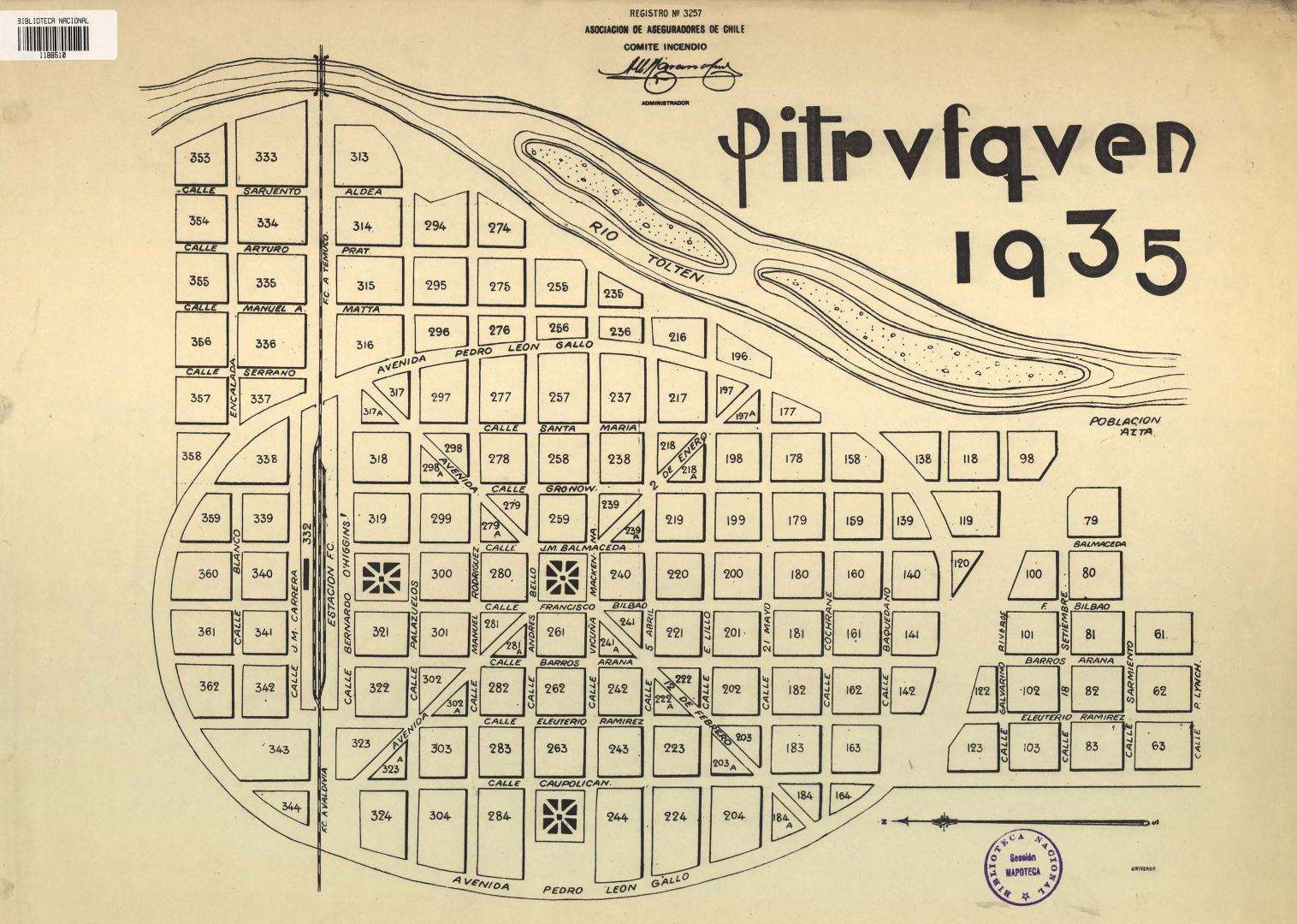 Pitrvfqvén 1935 [material cartográfico] / Asociación de Aseguradores de Chile Comité Incendio [Valparaíso] : Universo, 1935. 1 plano : montado en lienzo ; 37 x 53 cm.